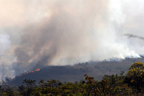 Incêndio no Parque Nacional de Brasília; queimada e destruição ambiental.